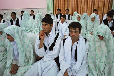 af Informationsnet i Afghanistan Med Reserveret er fri(شبکه اطلاع رسانی افغانستان)